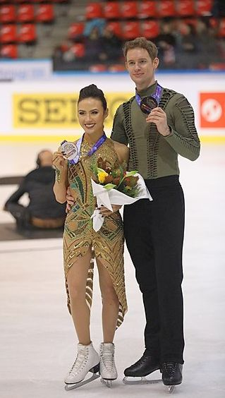 Médaillés d'argent en danse sur glace aux Internationaux de France 2019.